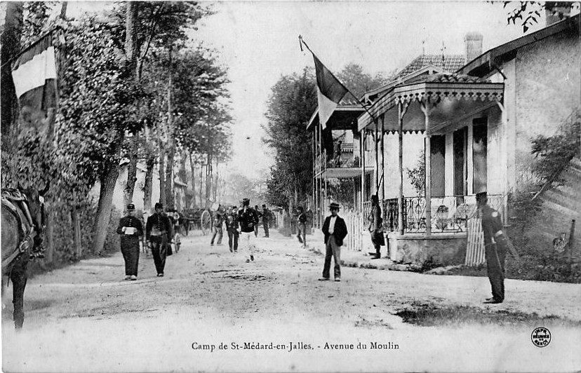 Avenue du Moulin avec la maison de l'État Major.